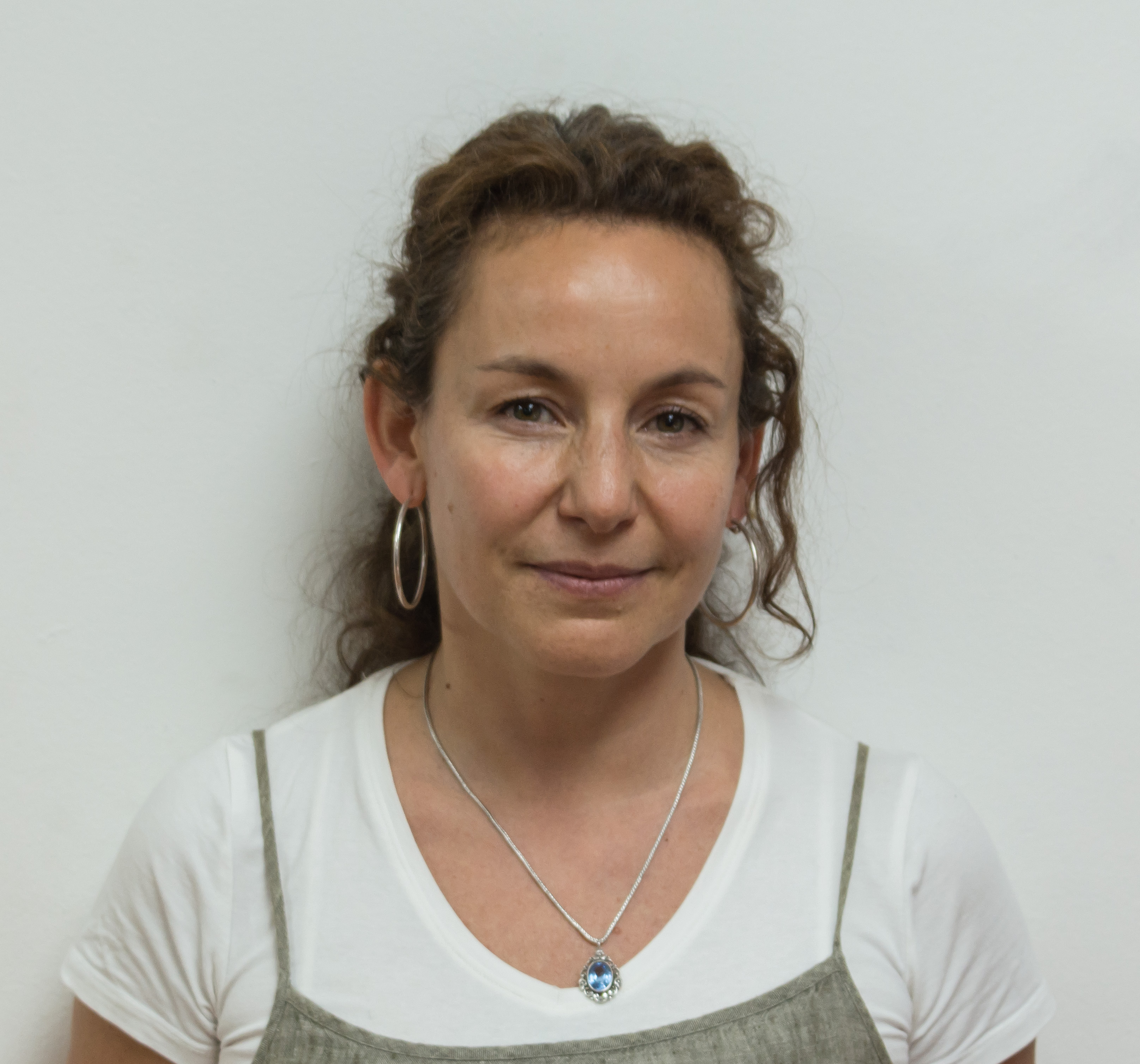 Camila Fadda, Editatón de Escritores Chilenos, UTEM, Santiago, Chile